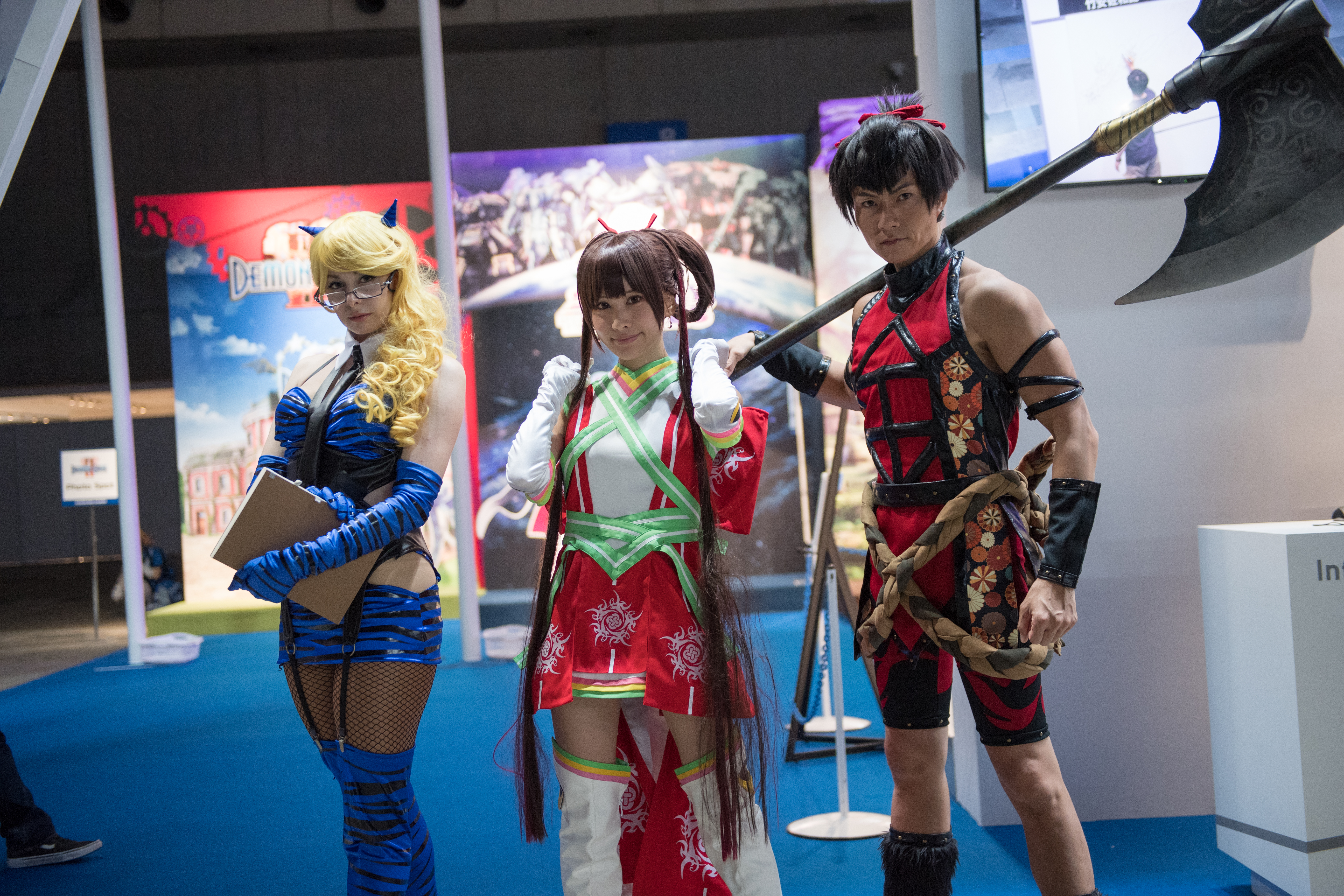 東京ゲームショウ2016の角川ブースの「GOD WARS ～時をこえて～」での写真です。左からコスプレイヤーのユリコ・タイガー、立石都美、ウサコ。